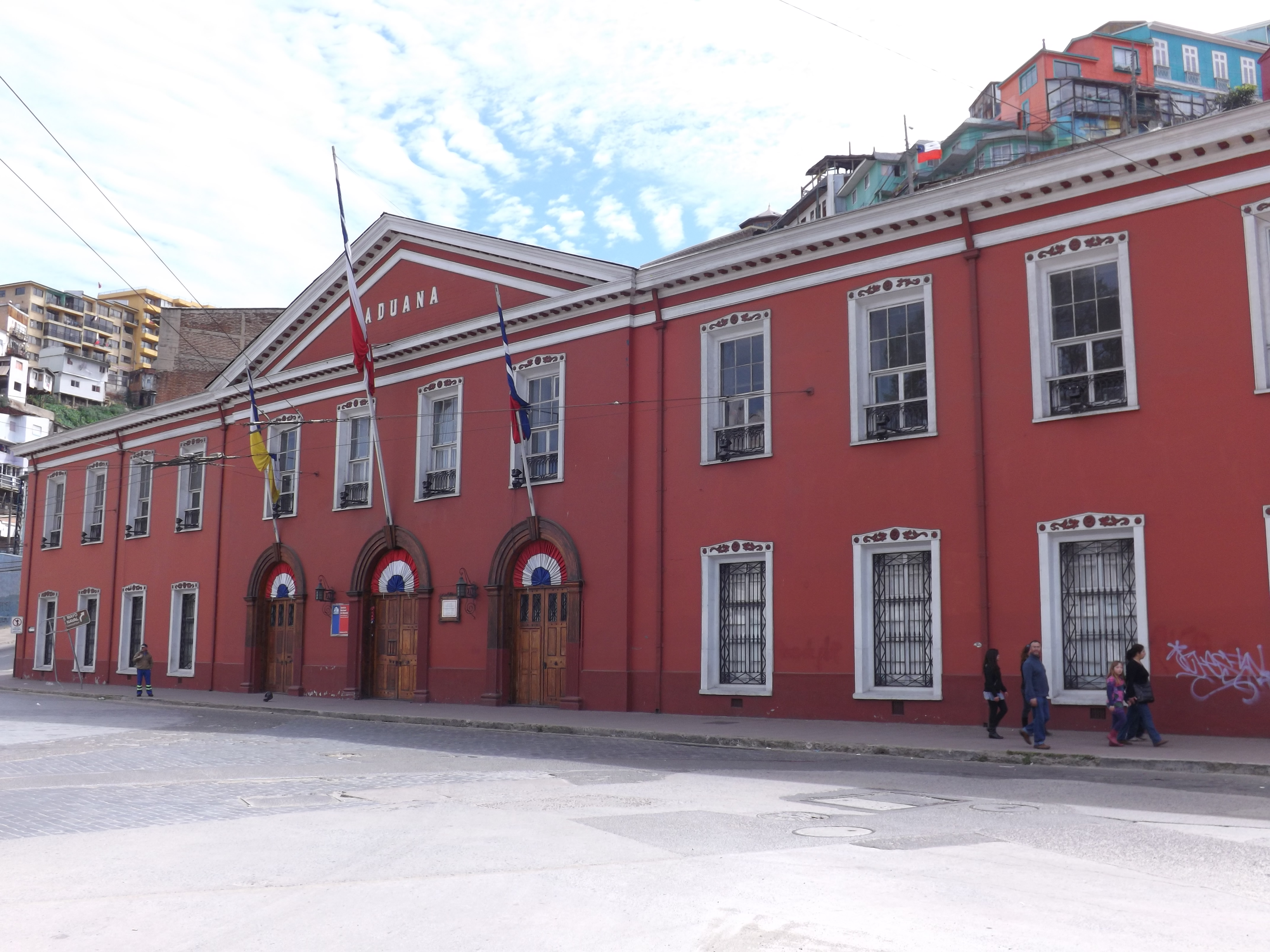 Aduana de Valparaíso This is a photo of a national monument in Chile: 761